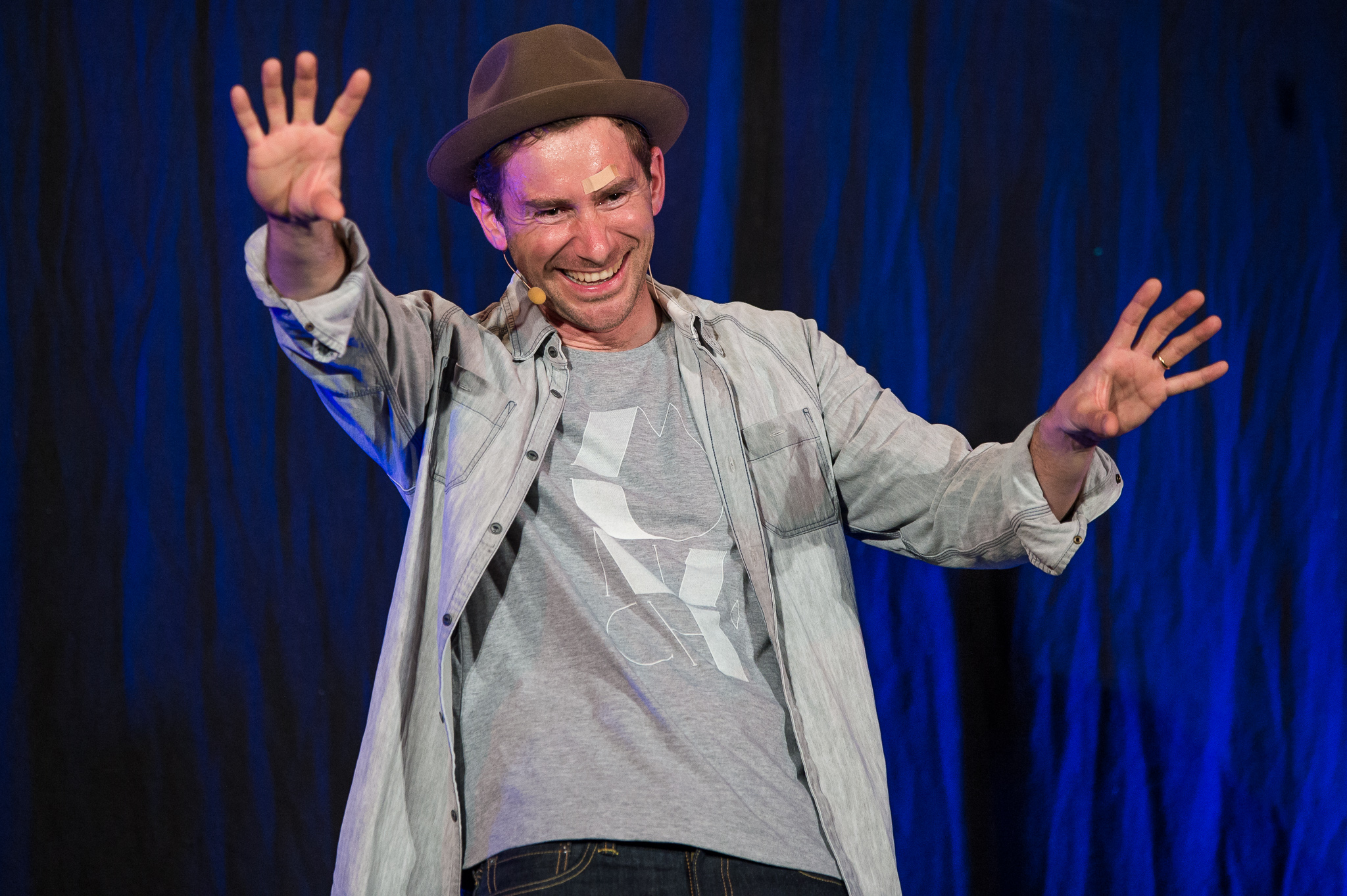 Concertbüro Franken,Gutmann am Dutzendteich,Harry G,Markus Stoll